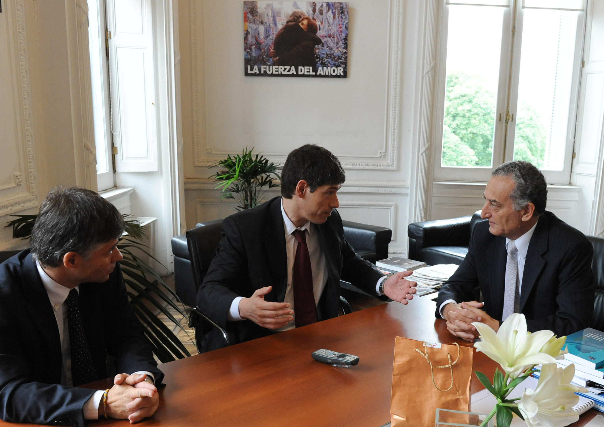 El jefe de Gabinete recibió a directivos de la DAIA